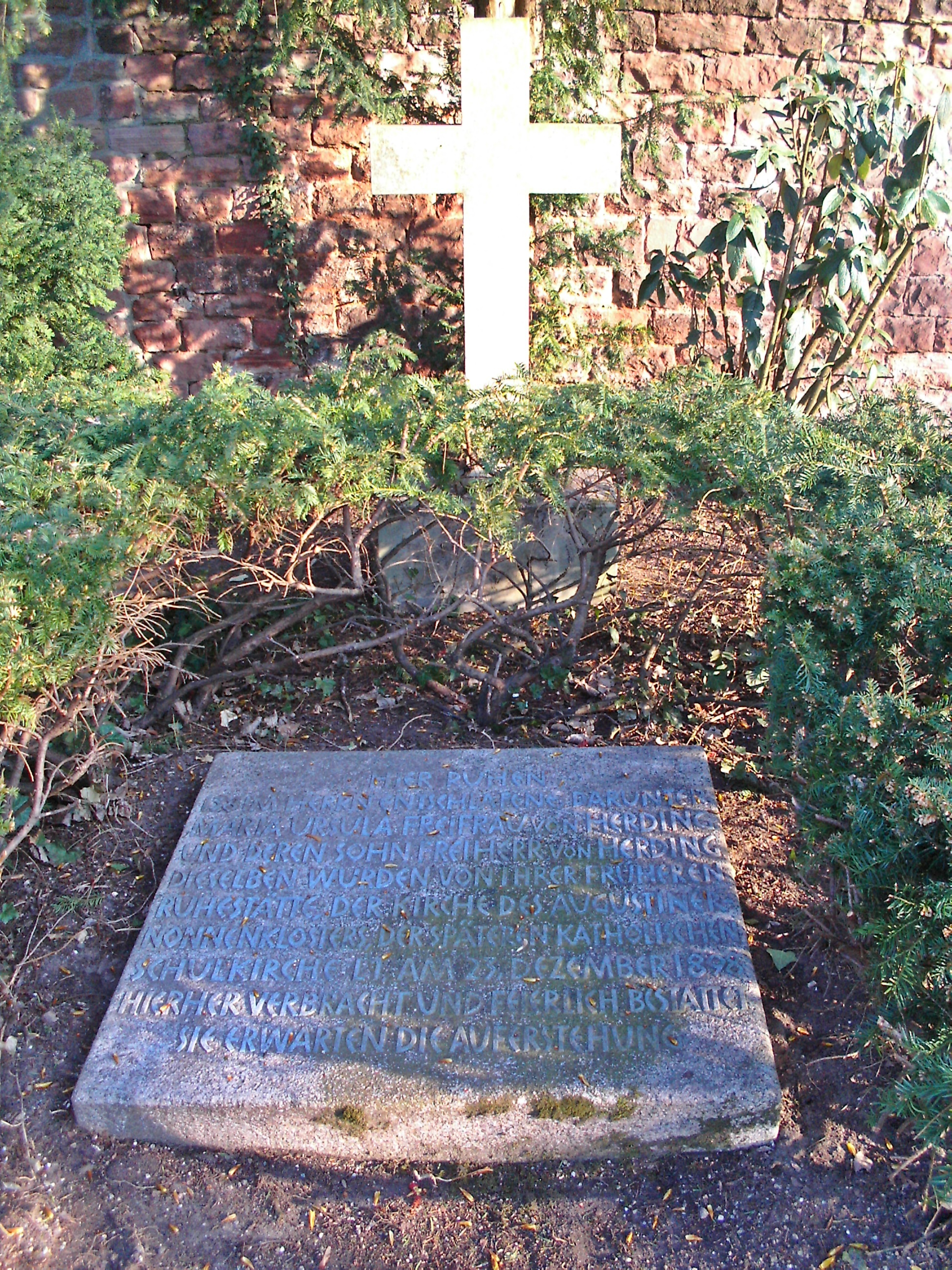 Mannheim Hauptfriedhof, Grab der Freifrau Josepha Ursula von Herding (1780-1849)